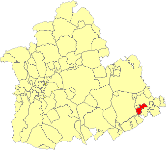 Situación de Gilena